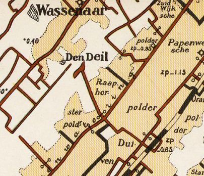 Raaphorster polder